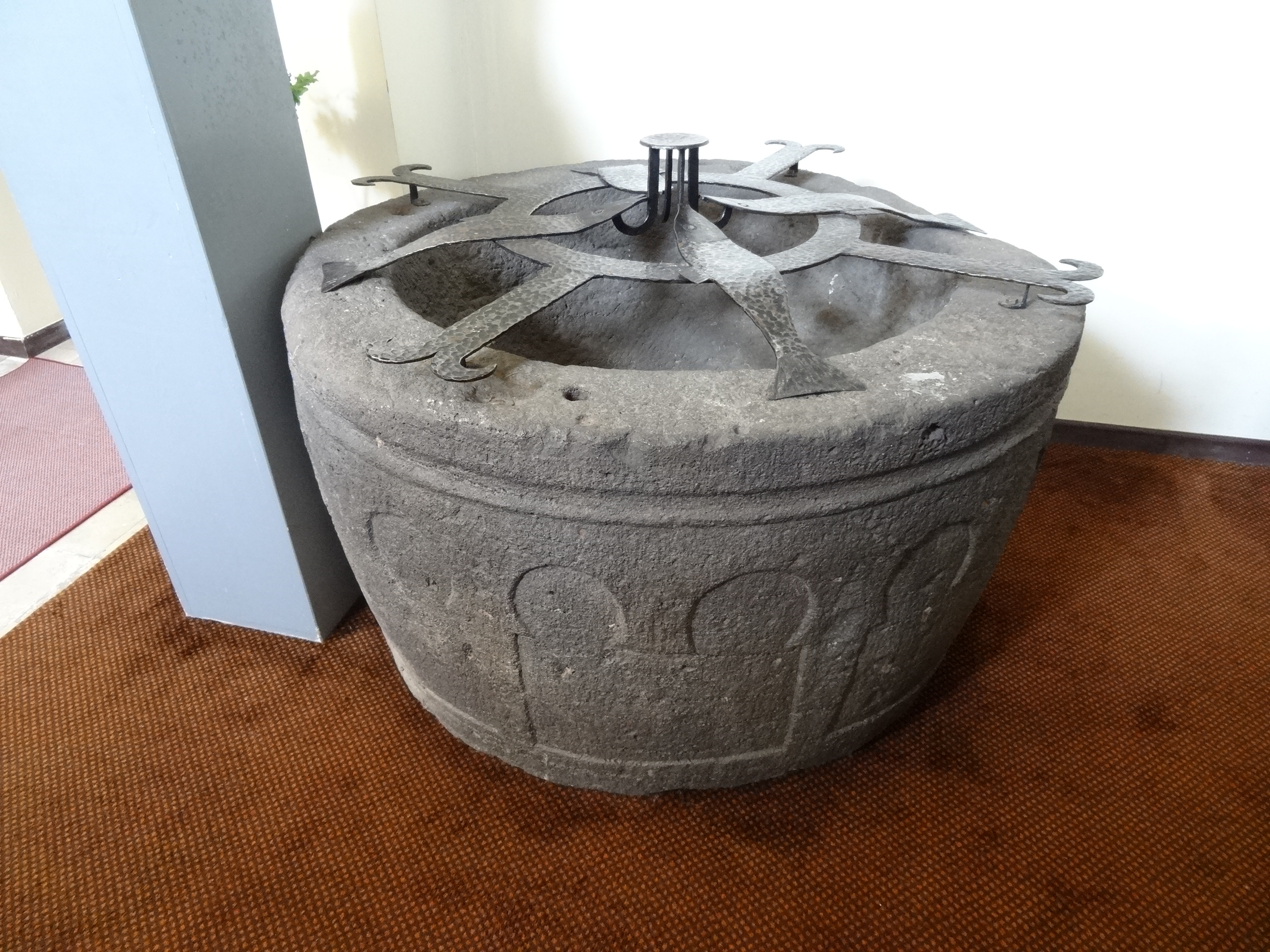 Evangelische Pfarrkirche Reiskirchen